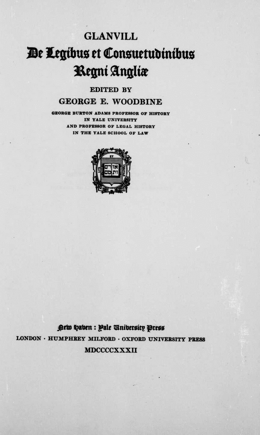 Frontespizio